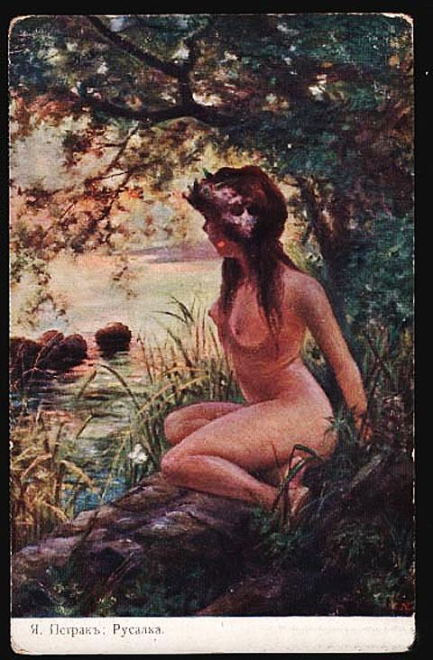 Ярослав Пстрак. Русалка.: Стара поштівка.